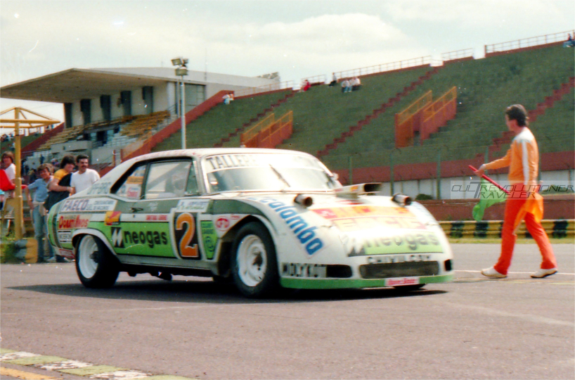 Emilio Satriano saliendo de la calle de boxes del autodromo de Bs. As. con el Chevrolet #2